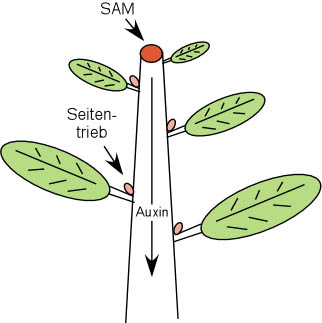 Bild wurde vom Autor selbst erstellt